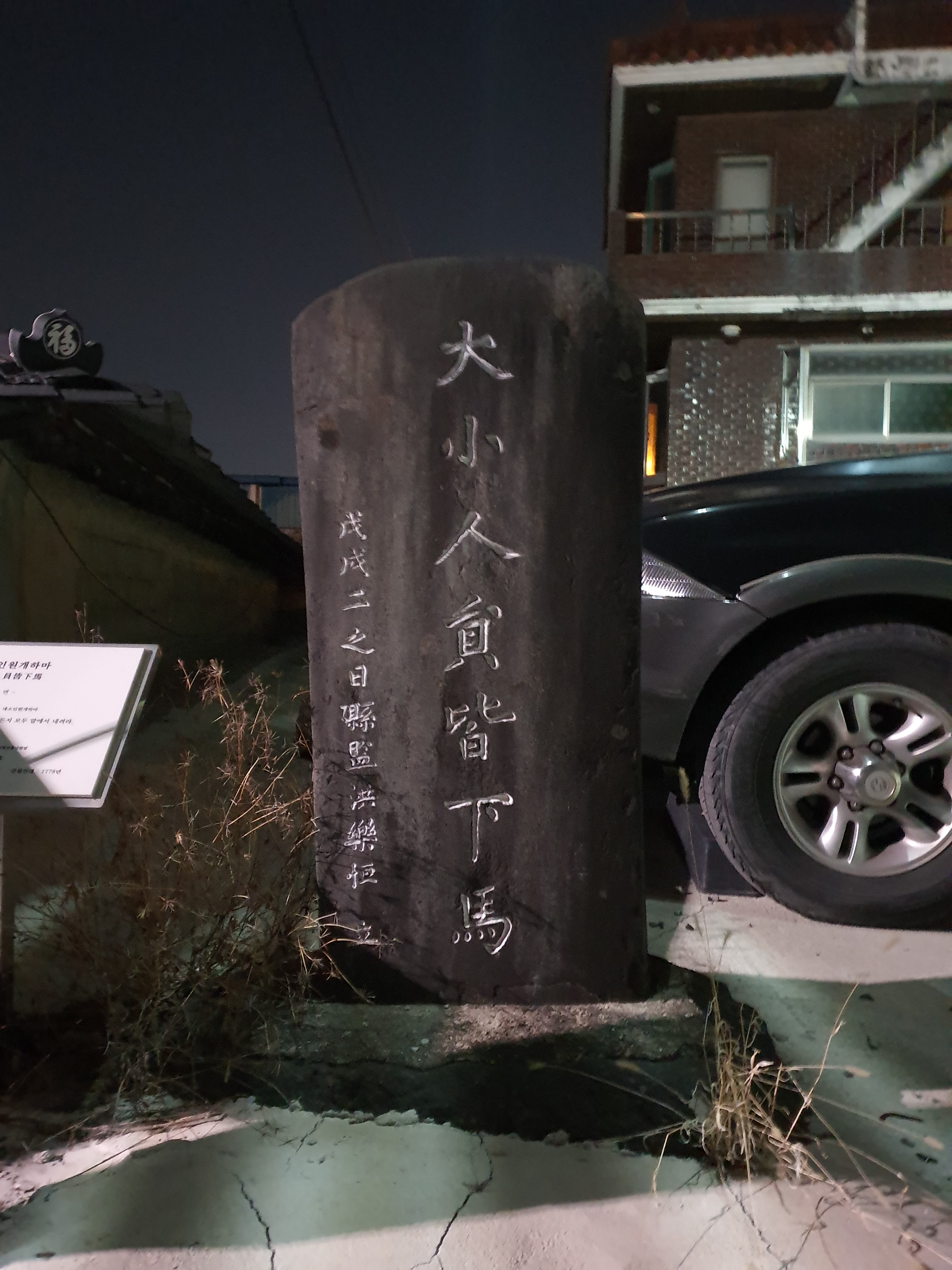 경상북도 경산시 자인향교 앞의 하마비